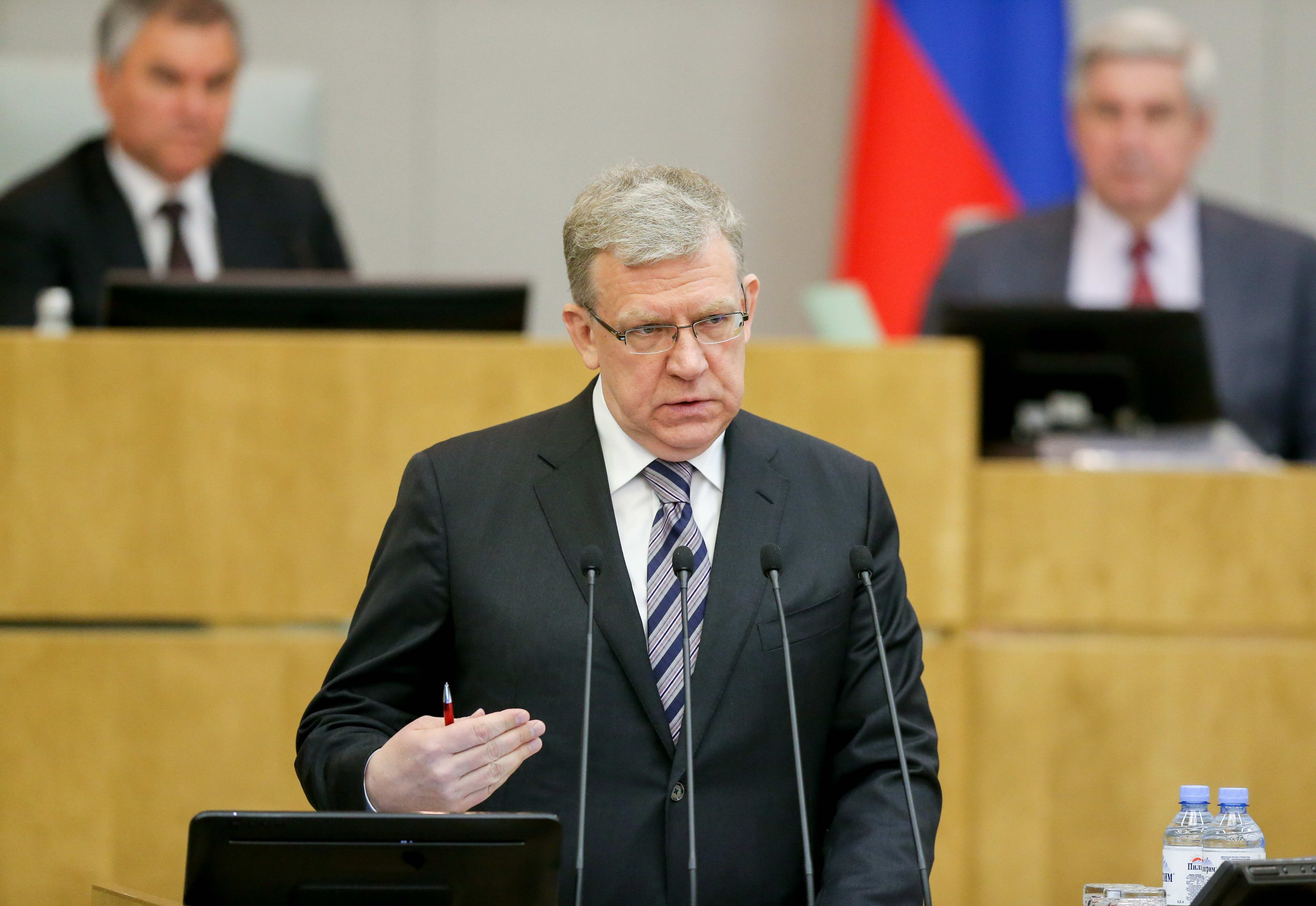 Алексей Кудрин в Государственной думе 22 мая 2018 года